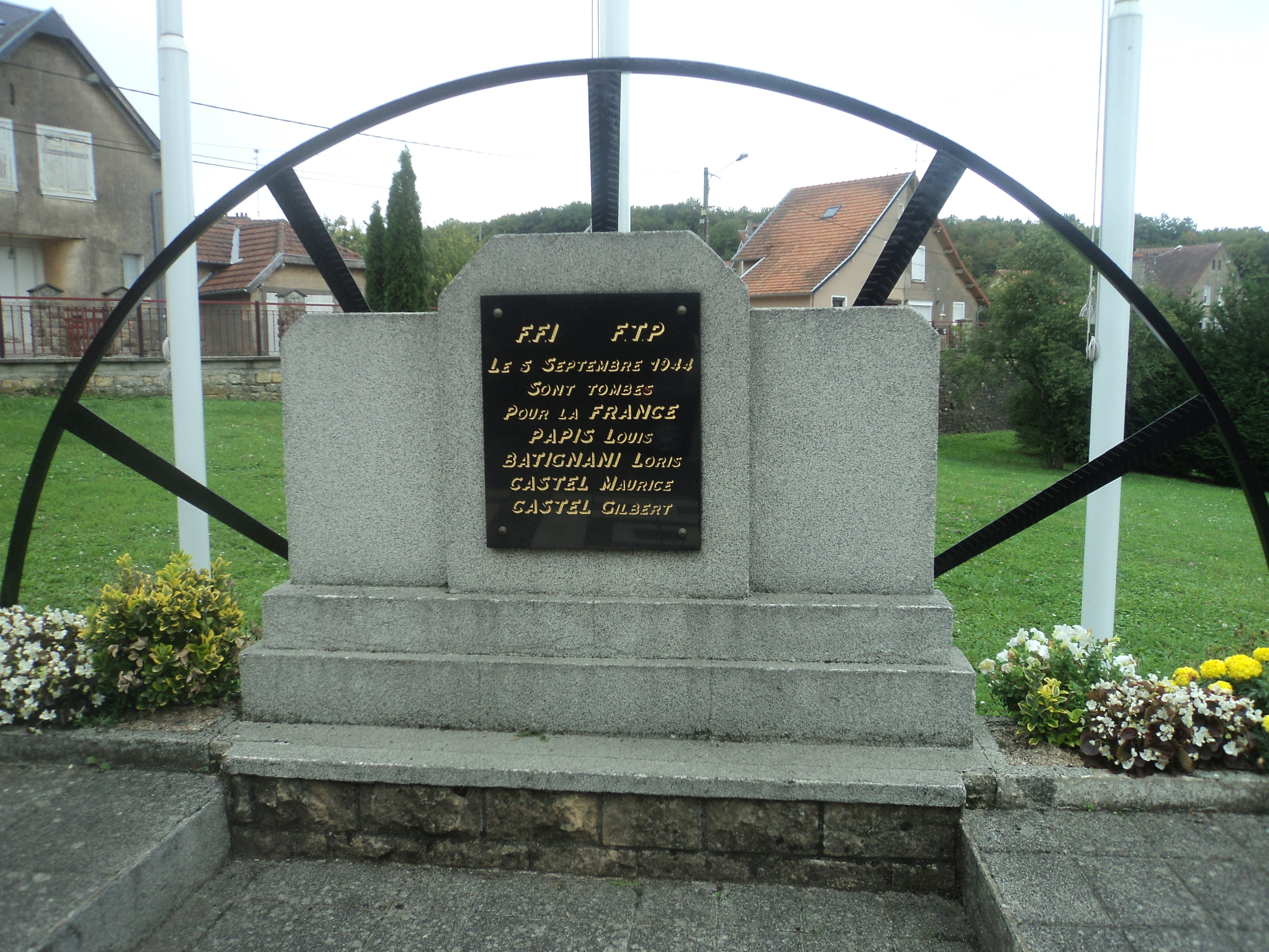 Tucquegnieux marine le munment comémoratif des résistants